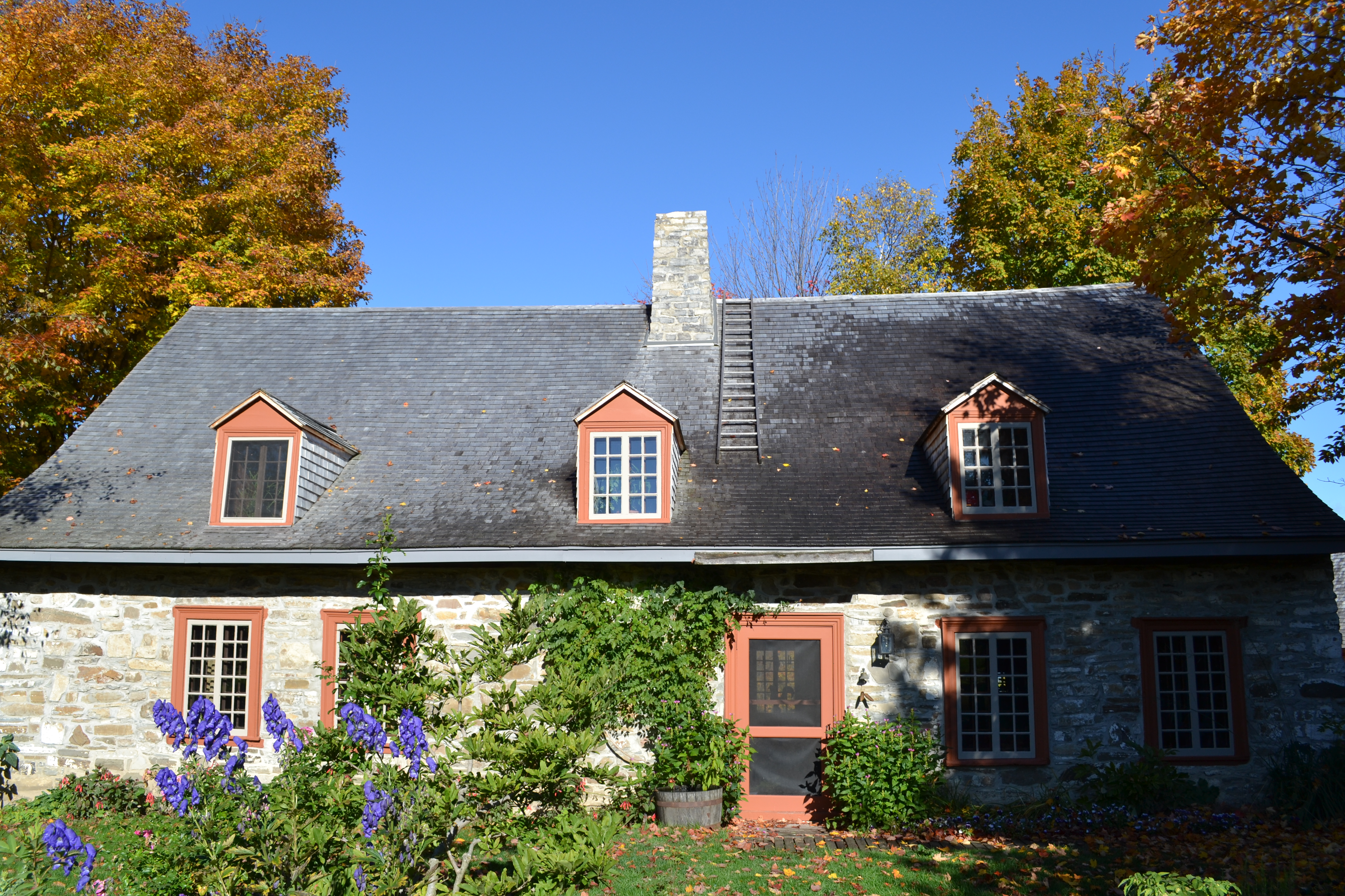 Maison Morisset, 4417, chemin Royal, Sainte-Famille (Canada). (Protection MH classé. Voir la liste des lieux patrimoniaux de la Capitale-Nationale pour plus de détails).